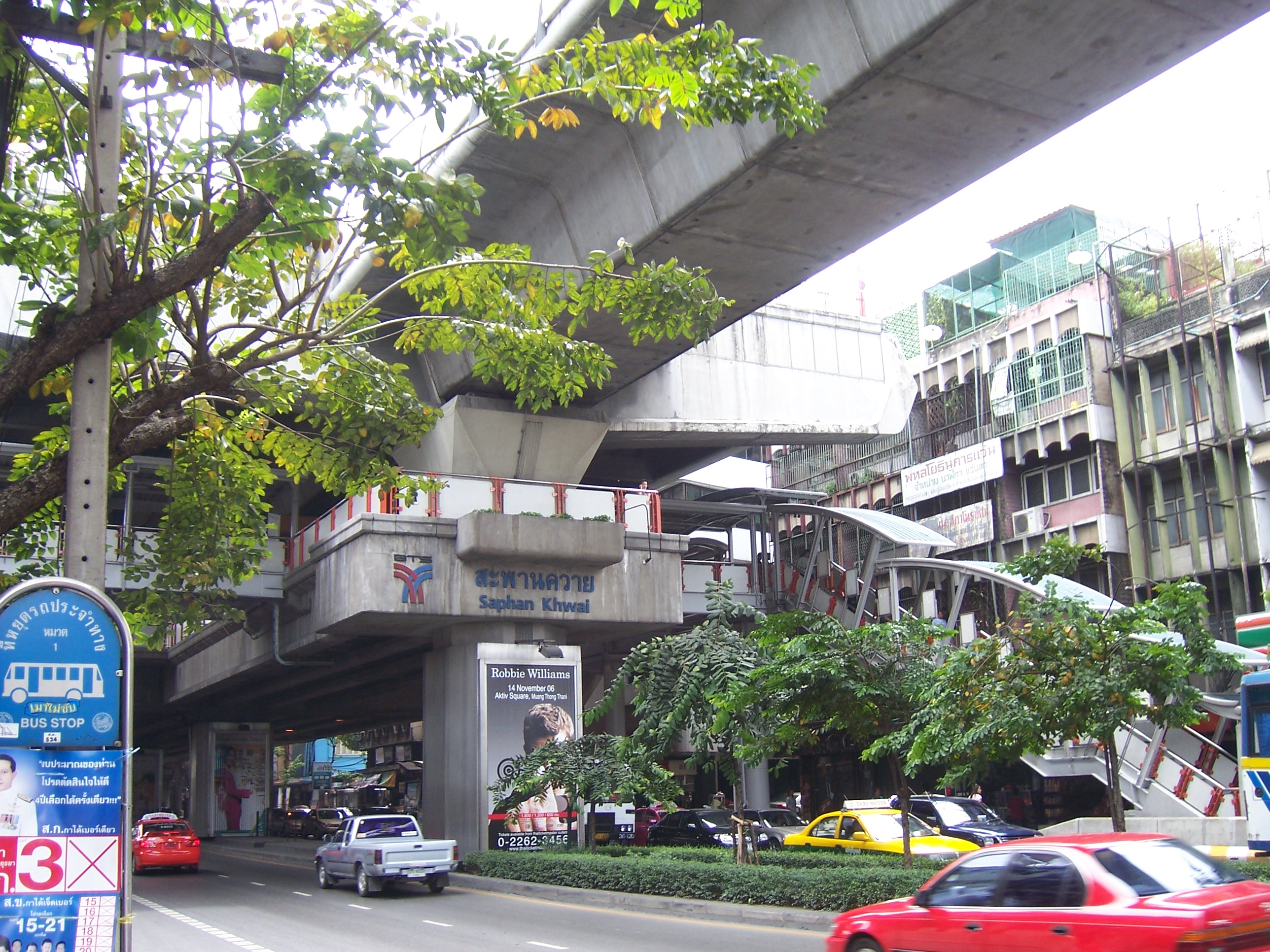 Saphan Khwal station, skytrain, Bangkok, Thailand